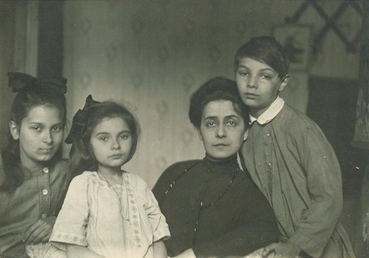 Tatiana de Schloezer with children in Moscow